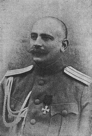 Михаил Федорович Ананио, герой Первой мировой войны, участник Белого движения: Чин/звание: «Генерал-майор», Знаки различия на картине: погоны «Полковник».